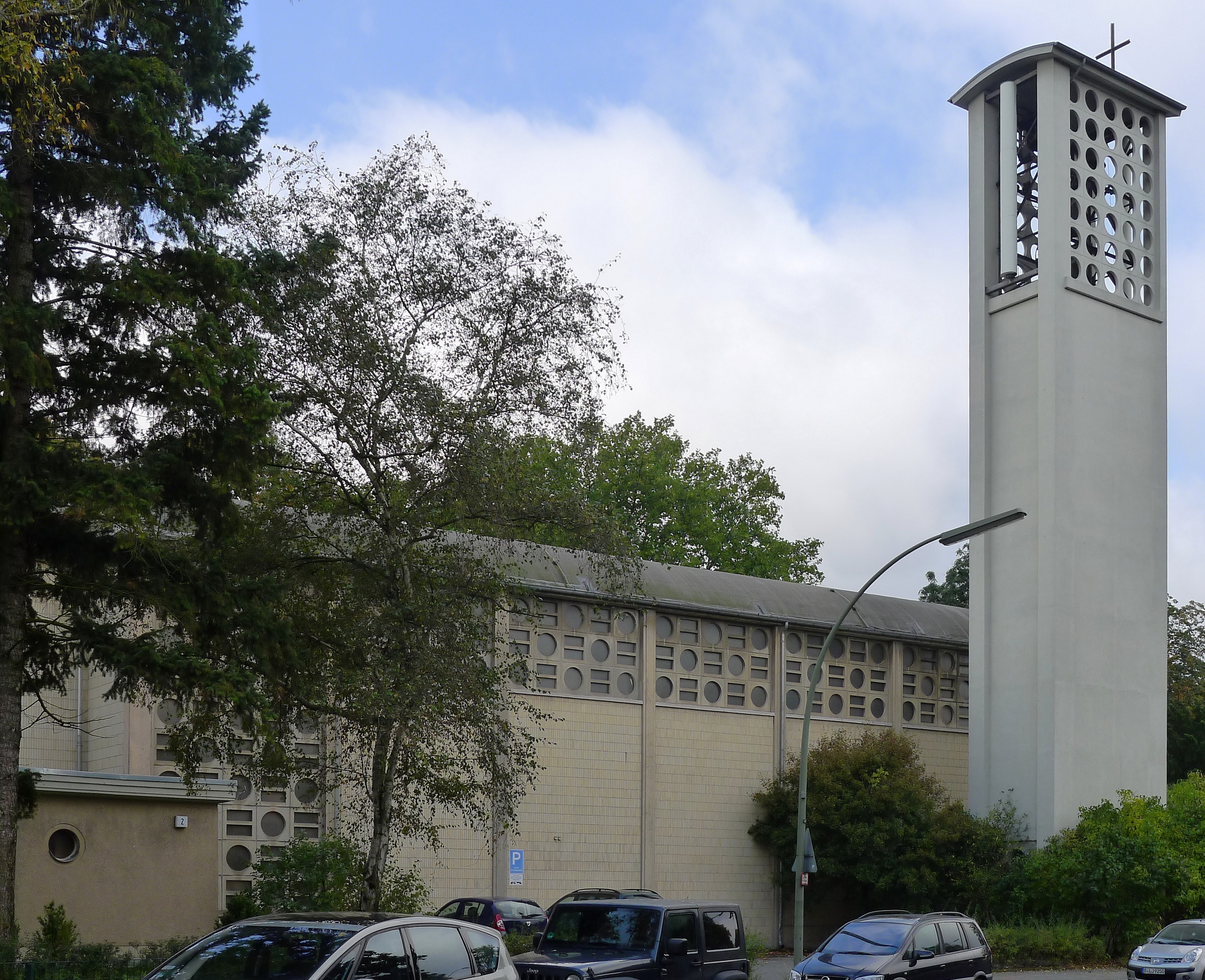 Blick auf die Kirche von der Schwyzer Straße aus